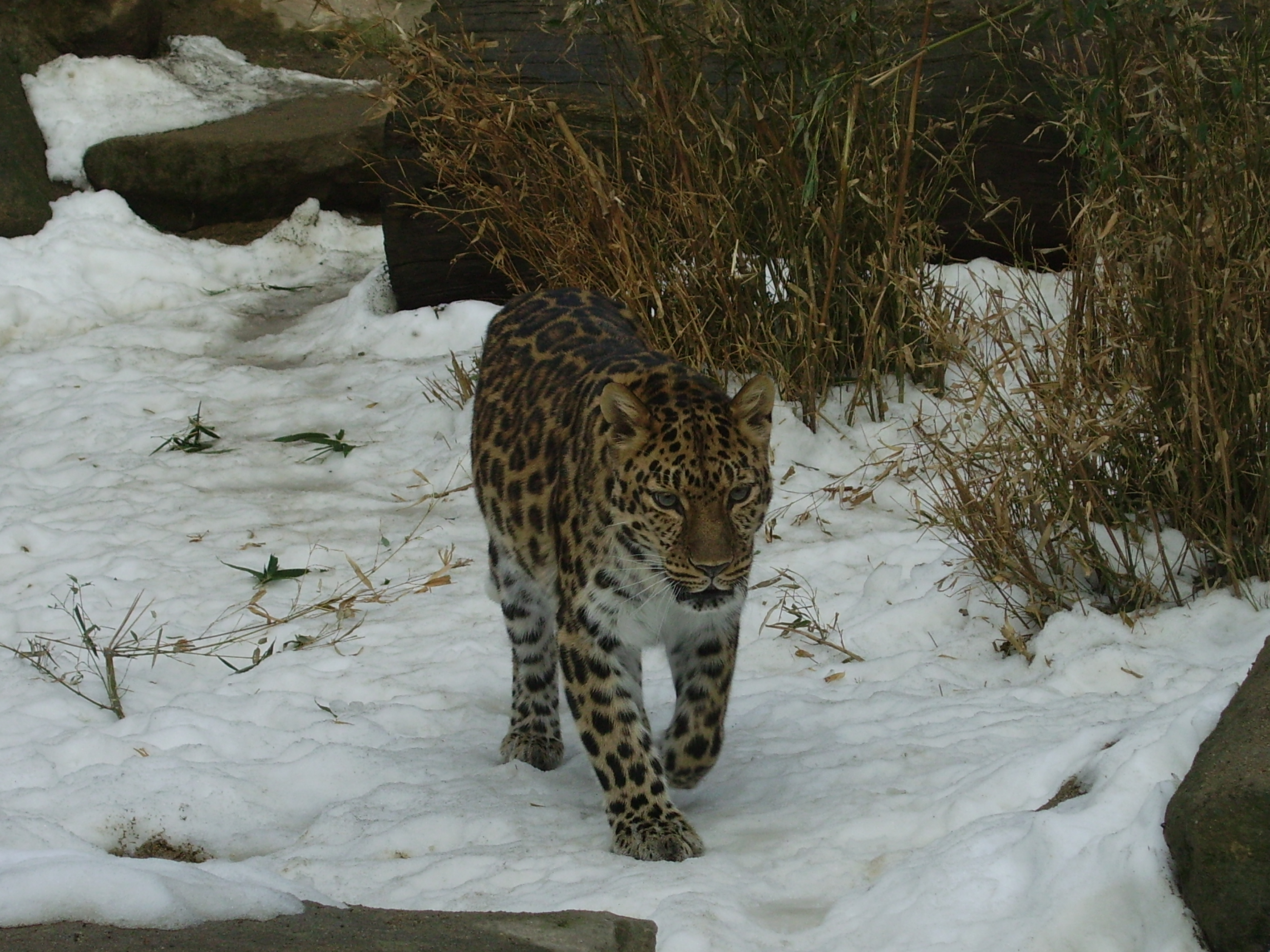 Levhart mandžuský; ZOO Olomouc